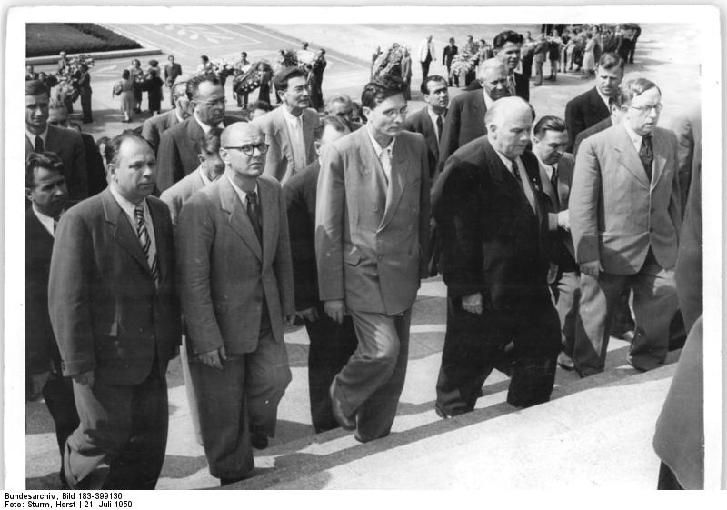 III.Parteitag der SED vom 20.-22.7.1950. Vom 20.-22.7.1950 findet in Berlin in der Werner-Seelenbinderhalle der III.Parteitag der Sozialistischen Einheitspartei Deutschlands statt. Am zweiten Tag des Parteitages (am 21.7.50) legten das Präsidium und Abordnungen der Delegierten am Ehrenmal der Sowjet-Armee in Terptow Kränze nieder. UBz:Wilhelm Pieck mit den ausländischen Gästen am Ehrenmal. In der Mitte M.A.Ssuslow.Sekretär des ZK der KPdSU(B.)rechts Pospelow Aufn.: Illus-Sturm 44 7320-50 21.7.50